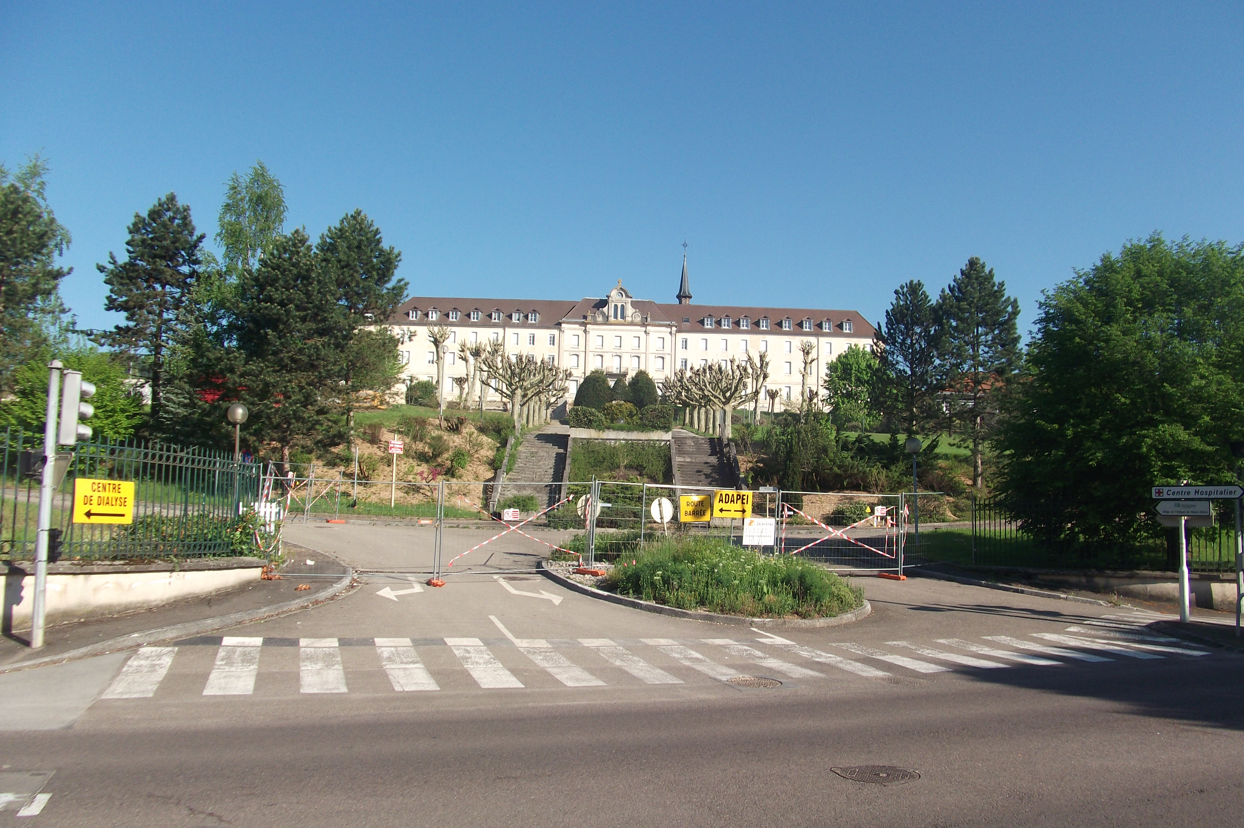 L'hôpital Paul-Morel de Vesoul (Haute-Saône, Franche-Comté)